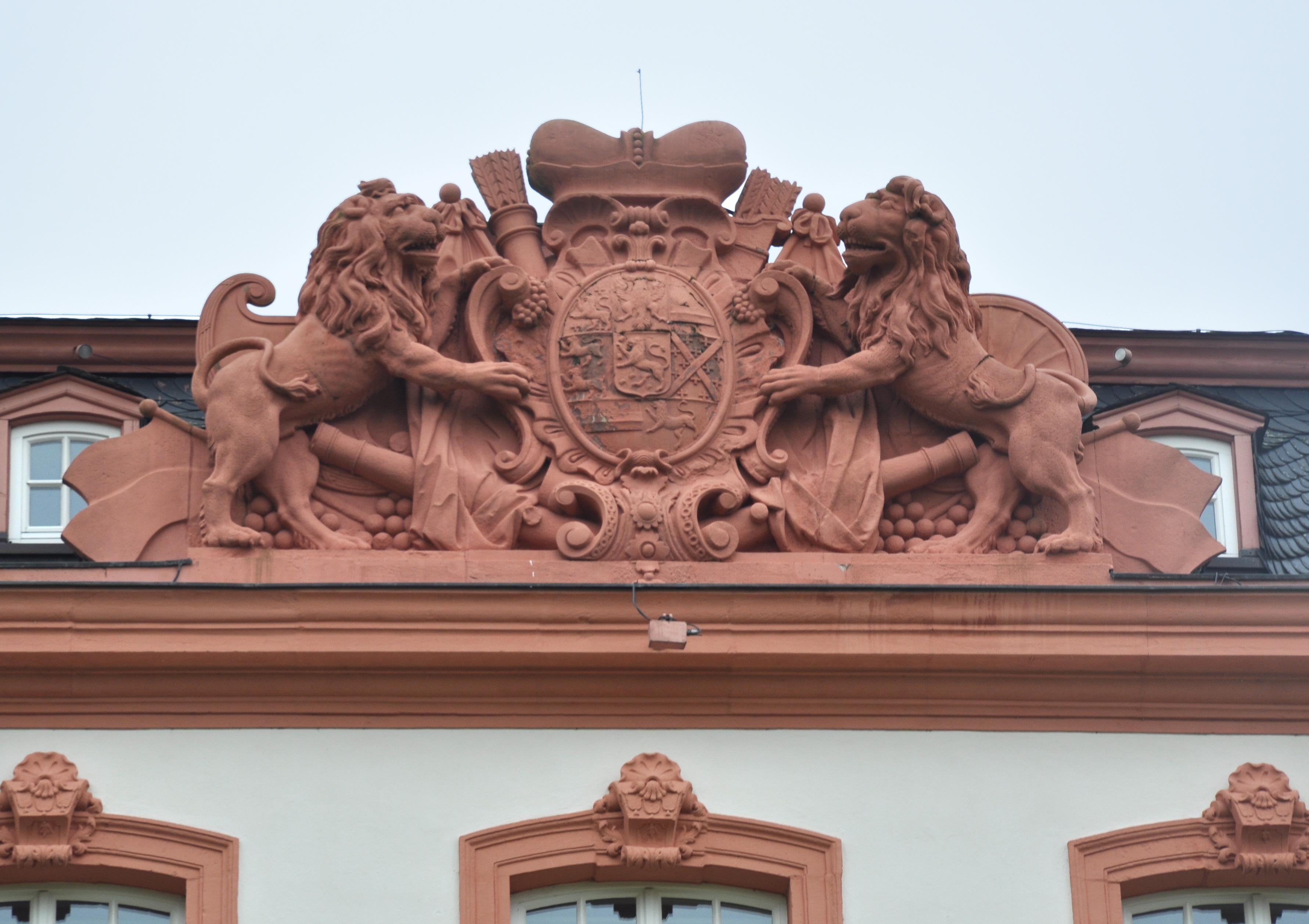 Wiesbaden-Biebrich, Schloss Biebrich, westlicher Pavillon, Wappenrelief an der Westseite, Wappen Georg August Samuel Fürst von Nassau-Idstein (1665-1721), siehe auch